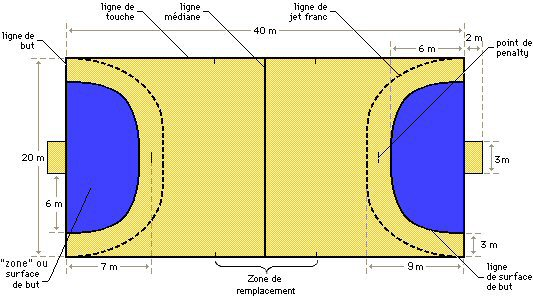 Dimensions d'un terrain de handball by simo leyli